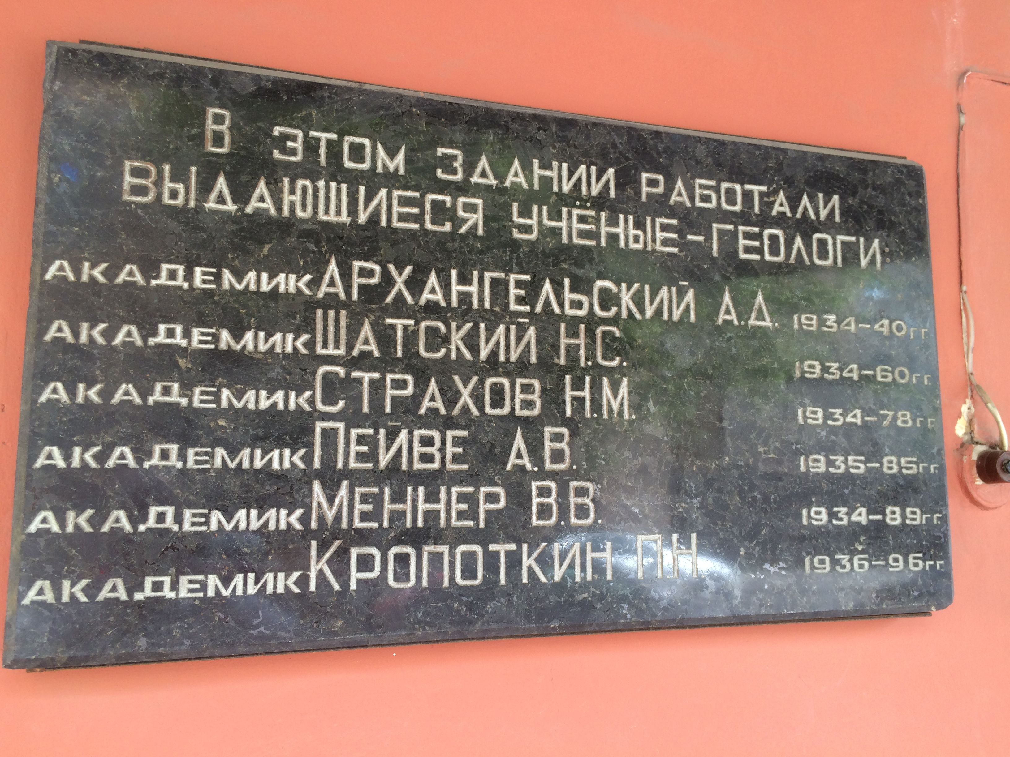 MoscowМемориальная доска у входа в Институт Геологии - Пыжевский переулок 7